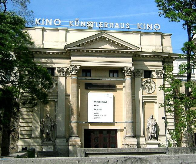 Wien, Austria: Künstlerhaus cinema